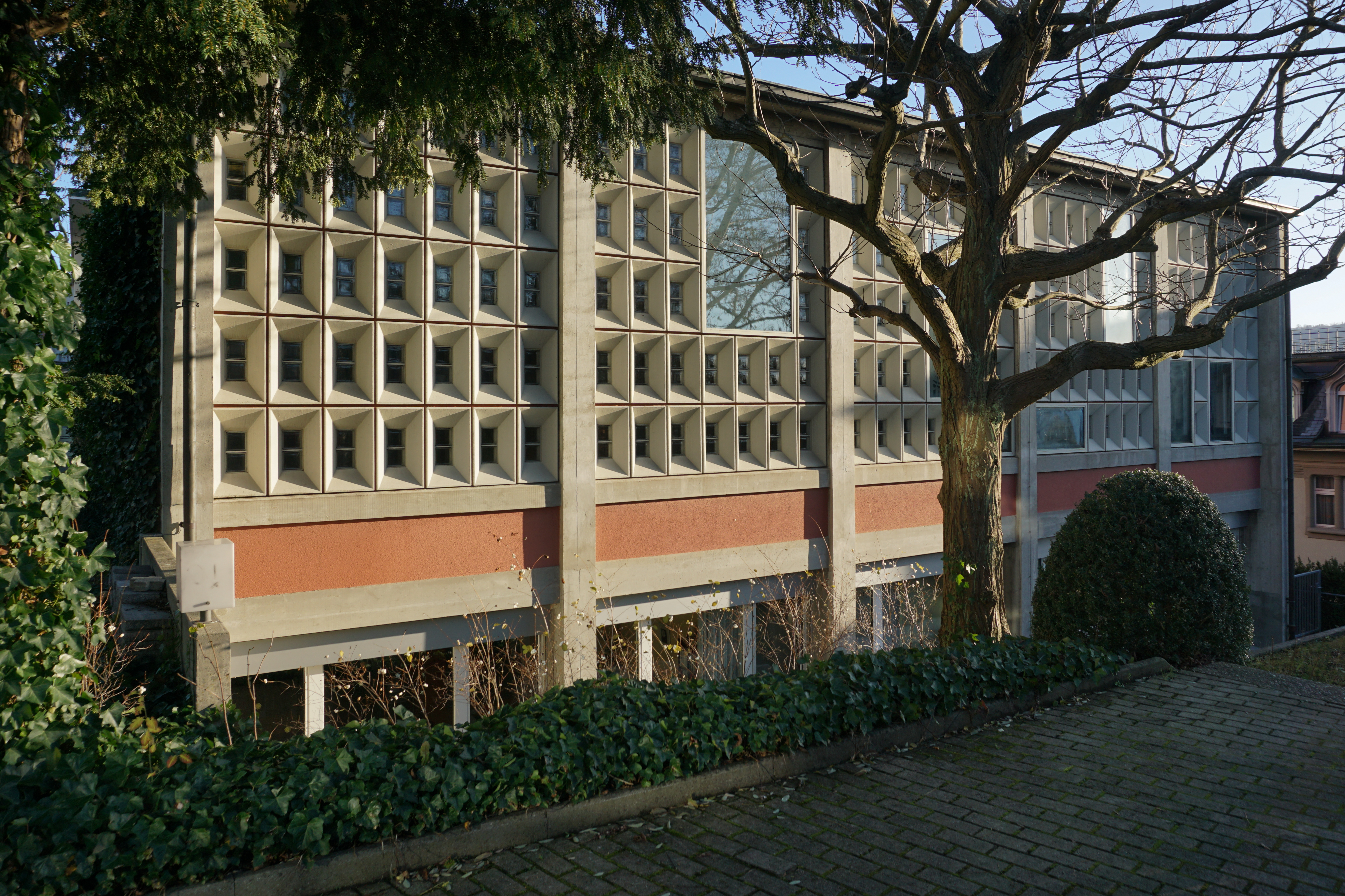 Fensterfassade mit Kassettenraster